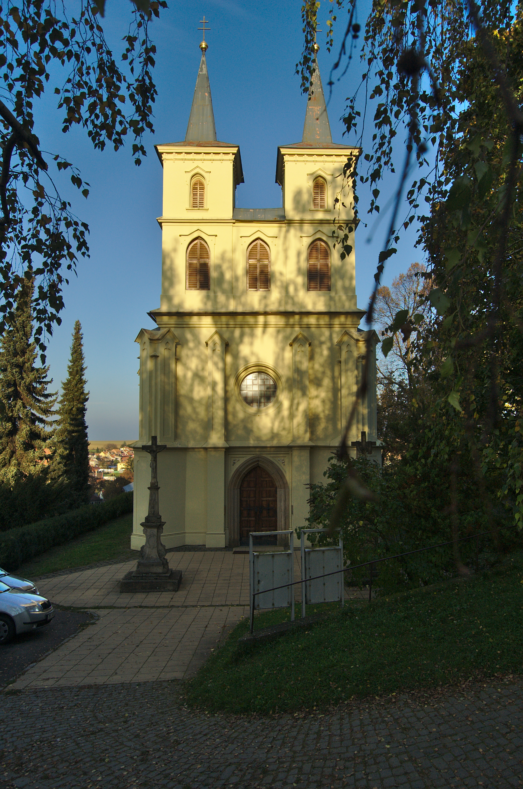 Kostel svatého Michala, Otaslavice, okres Prostějov